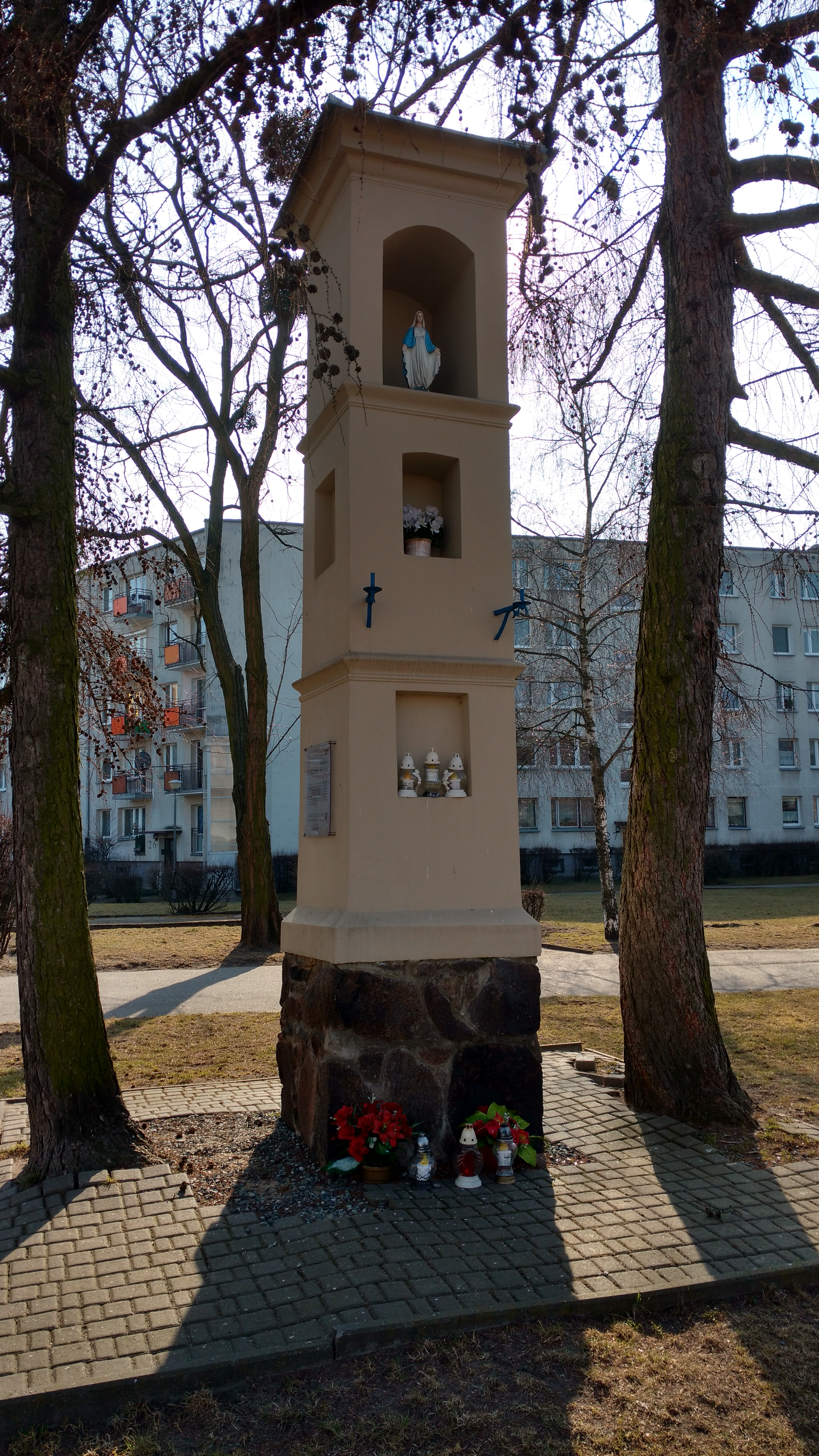 Kapliczka Matki Bożej na poznańskich Winiarach